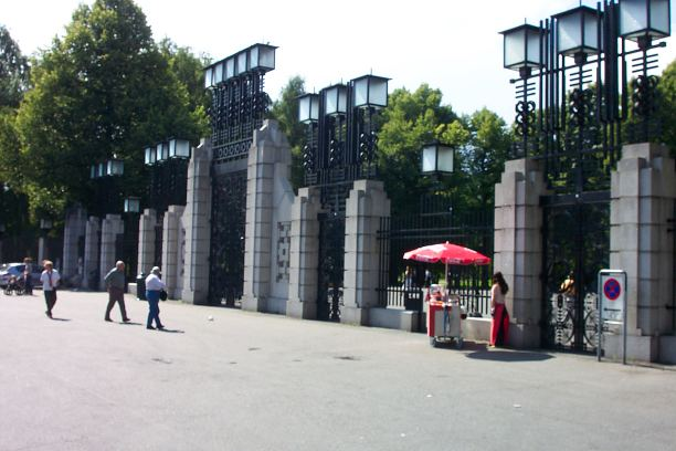 Vigelandspark